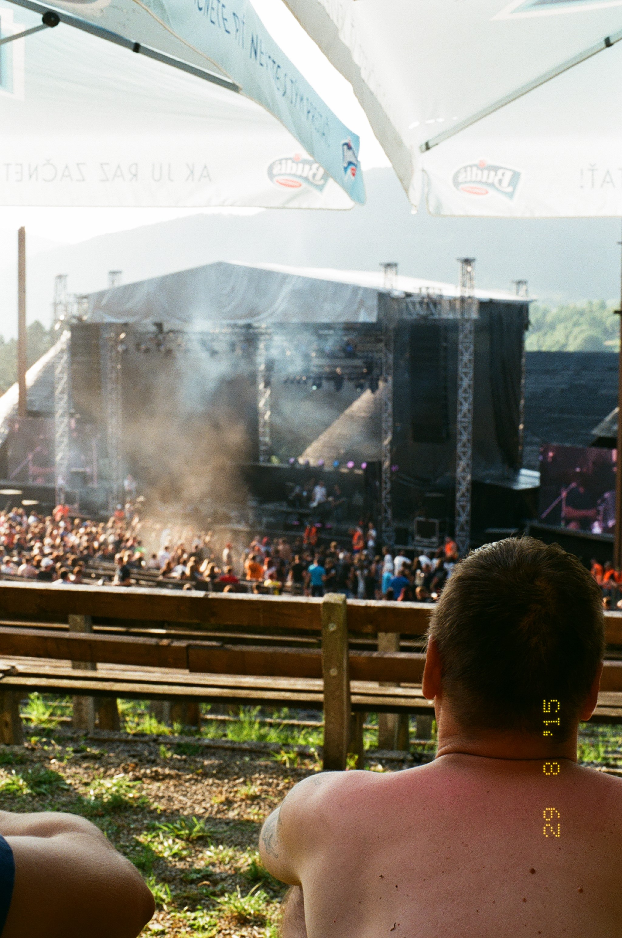 Rockový festival Terchovský Budzogáň, 2015